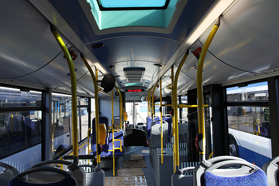 Przykładowe wnętrze Gdyńskiego autobusu